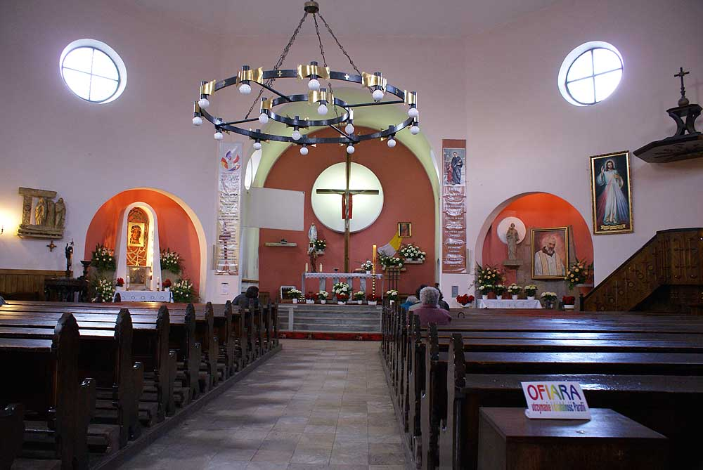 Kościół par. p.w. św. Józefa Robotnika W granicach murów obwodowych. Na działce geodezyjnej Nr 10, AM-20, obręb 0022 Południe Krakowska 46, Miasto Wrocław - Krzyki